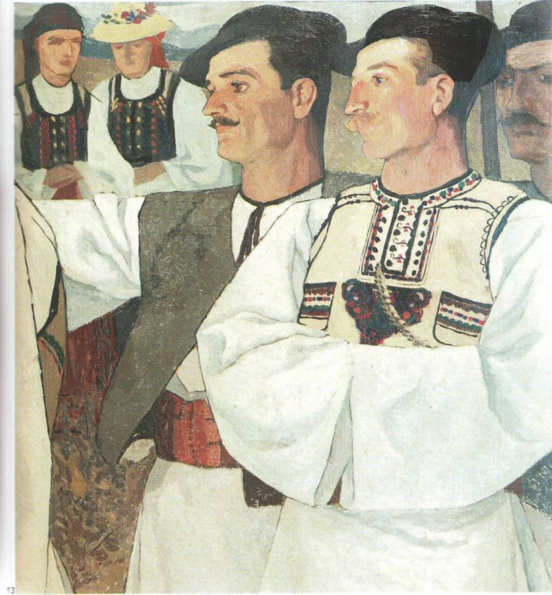 Ion Theodorescu-Sion - Ţărani din Abrud.